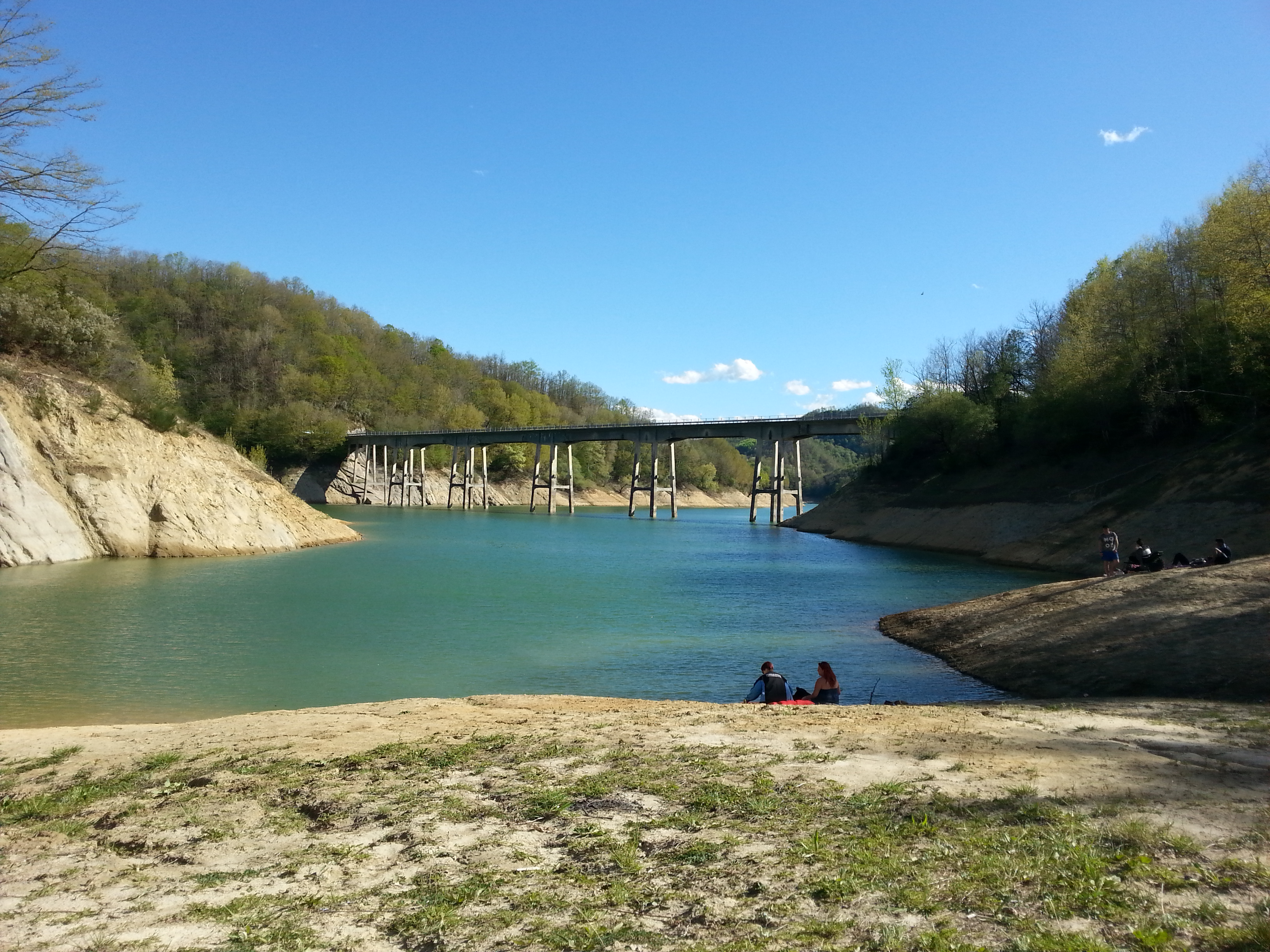 Il Ponte della Moletta, che attraversa un'insenatura del Lago del Salto nei pressi di Borgo San Pietro (frazione di Petrella Salto), posto al km 16 della strada provinciale 67 "Salto Cicolana"